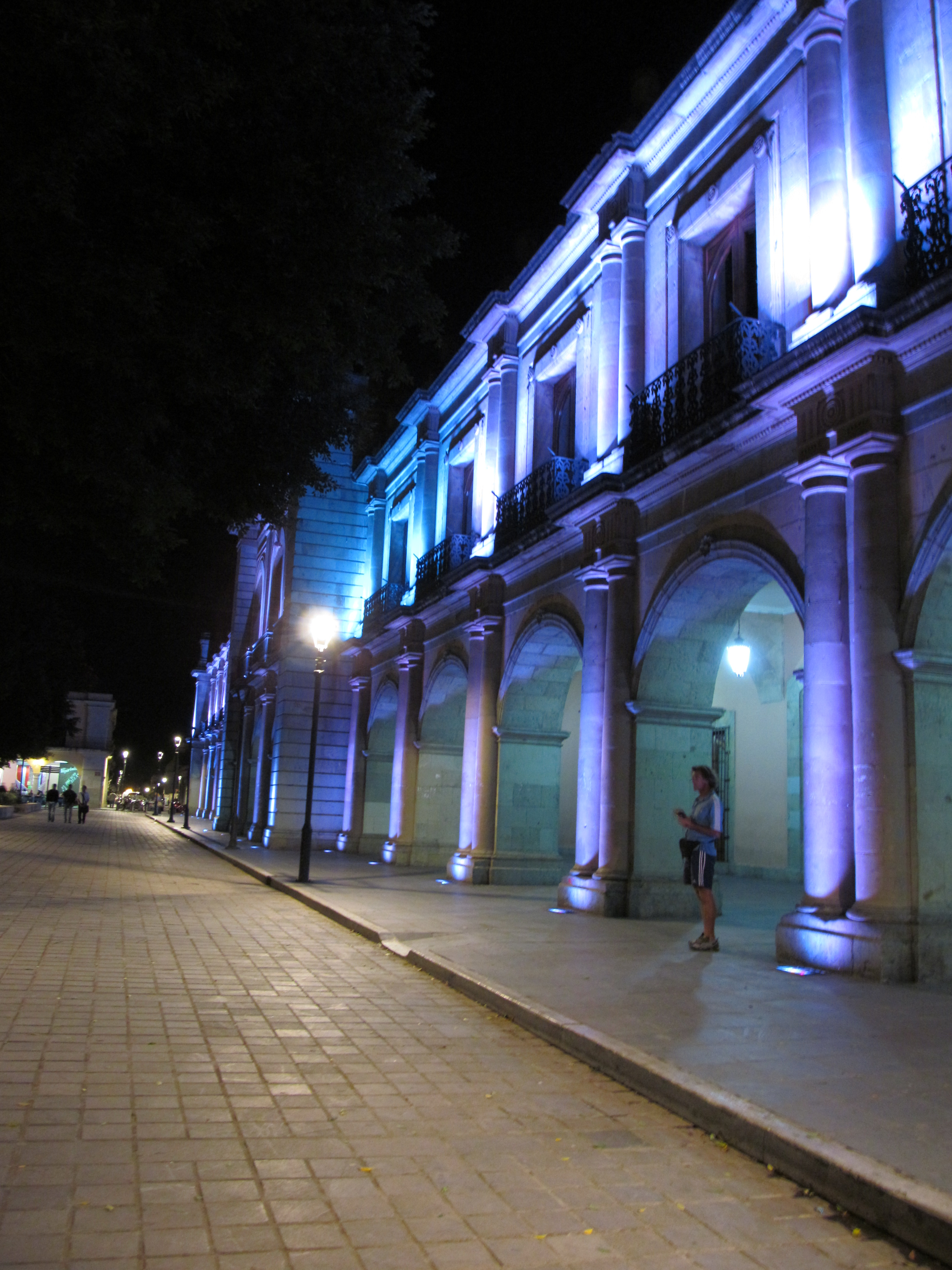 Centro histórico iluminado.